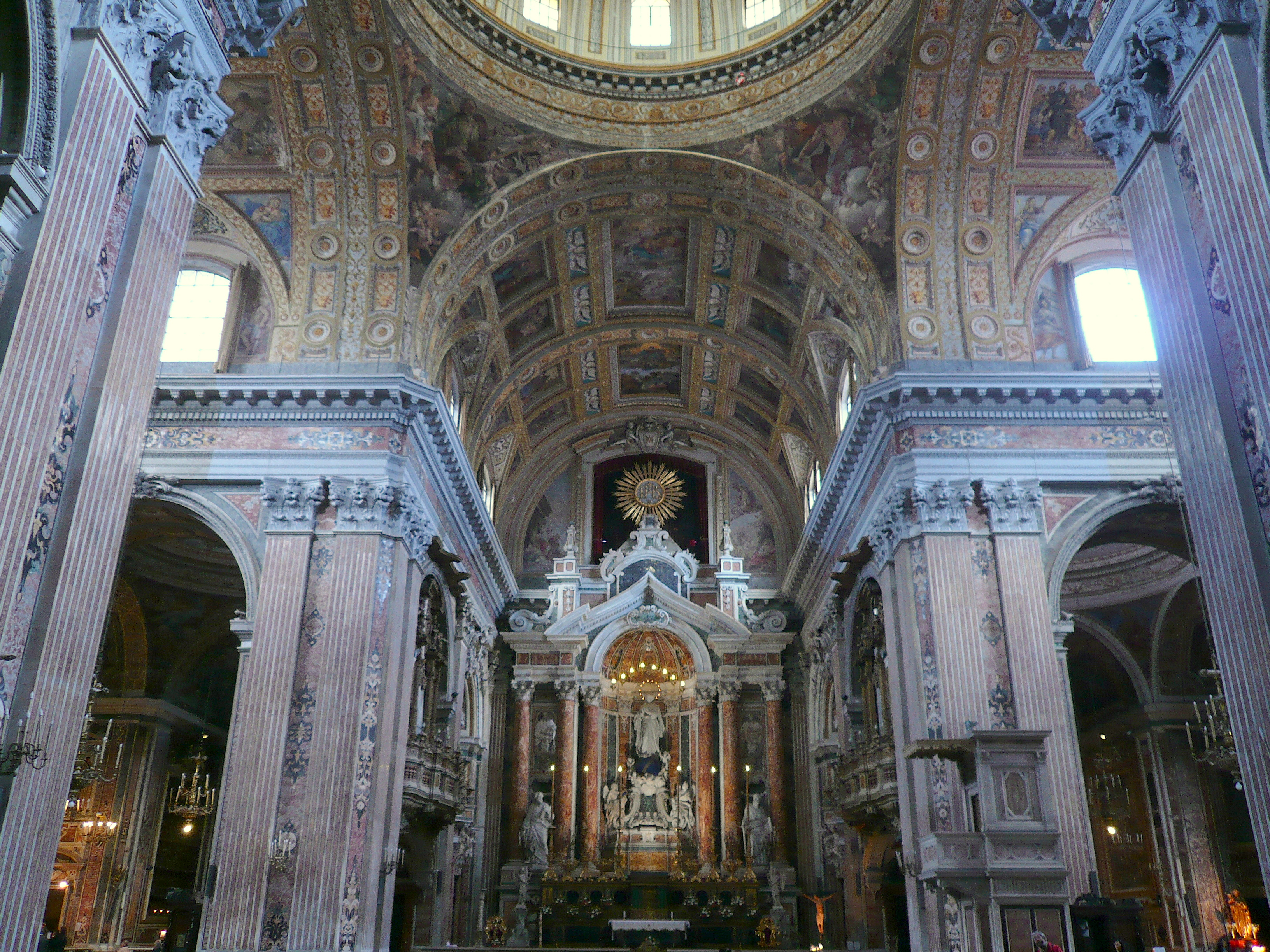 navata principale della Chiesa del Gesù Nuovo di Napoli. Autore foto: Roberto De Martino